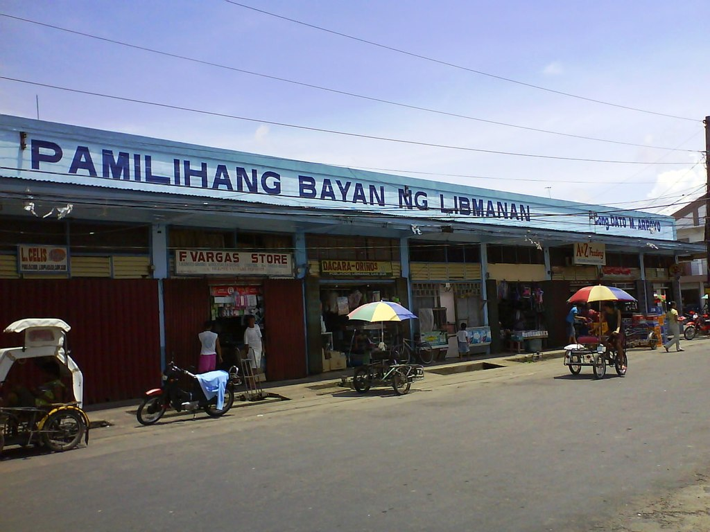 Libmanan, Camarines Sur, Philippines